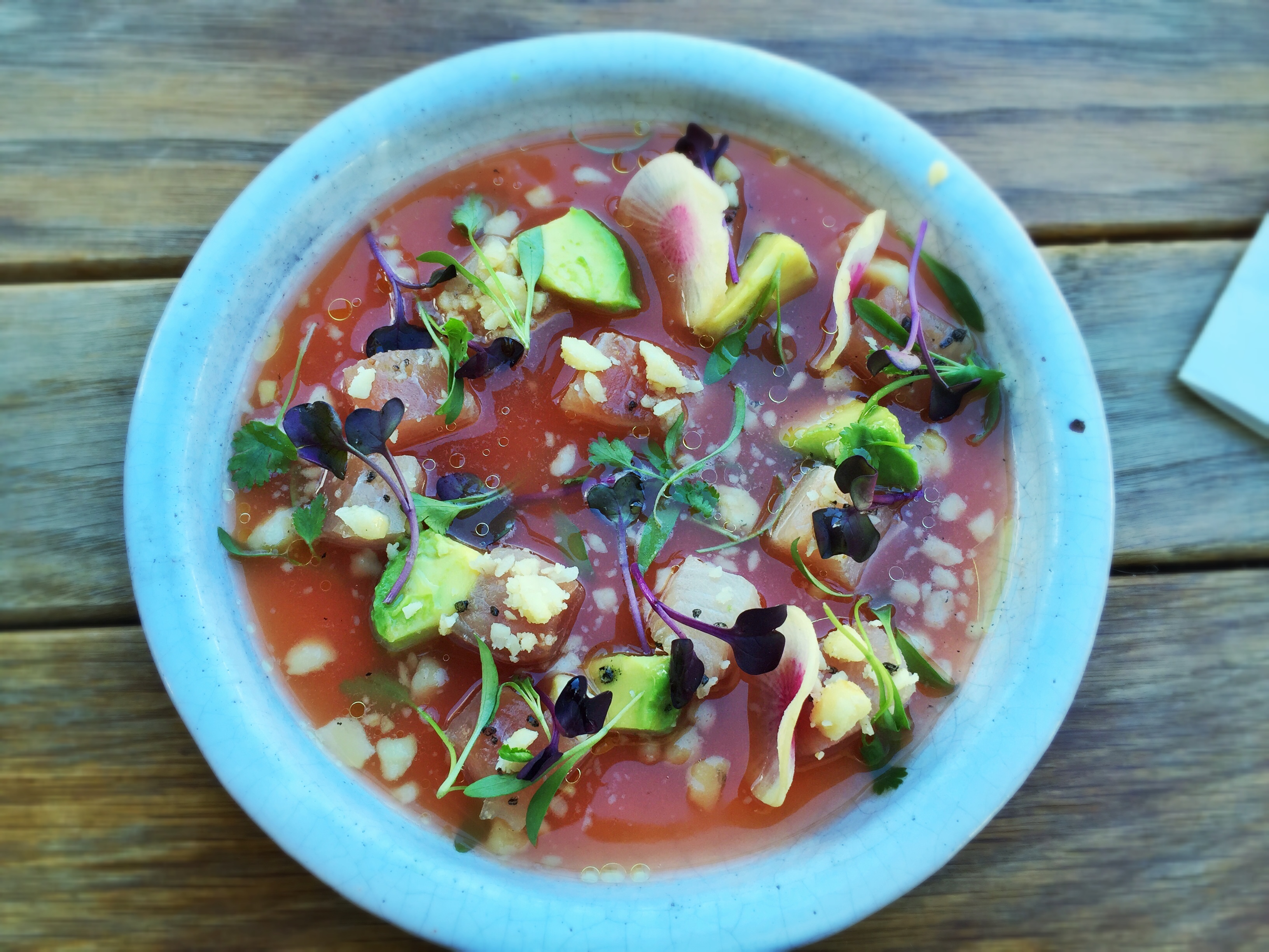 Taco Maria, Costa Mesa CA